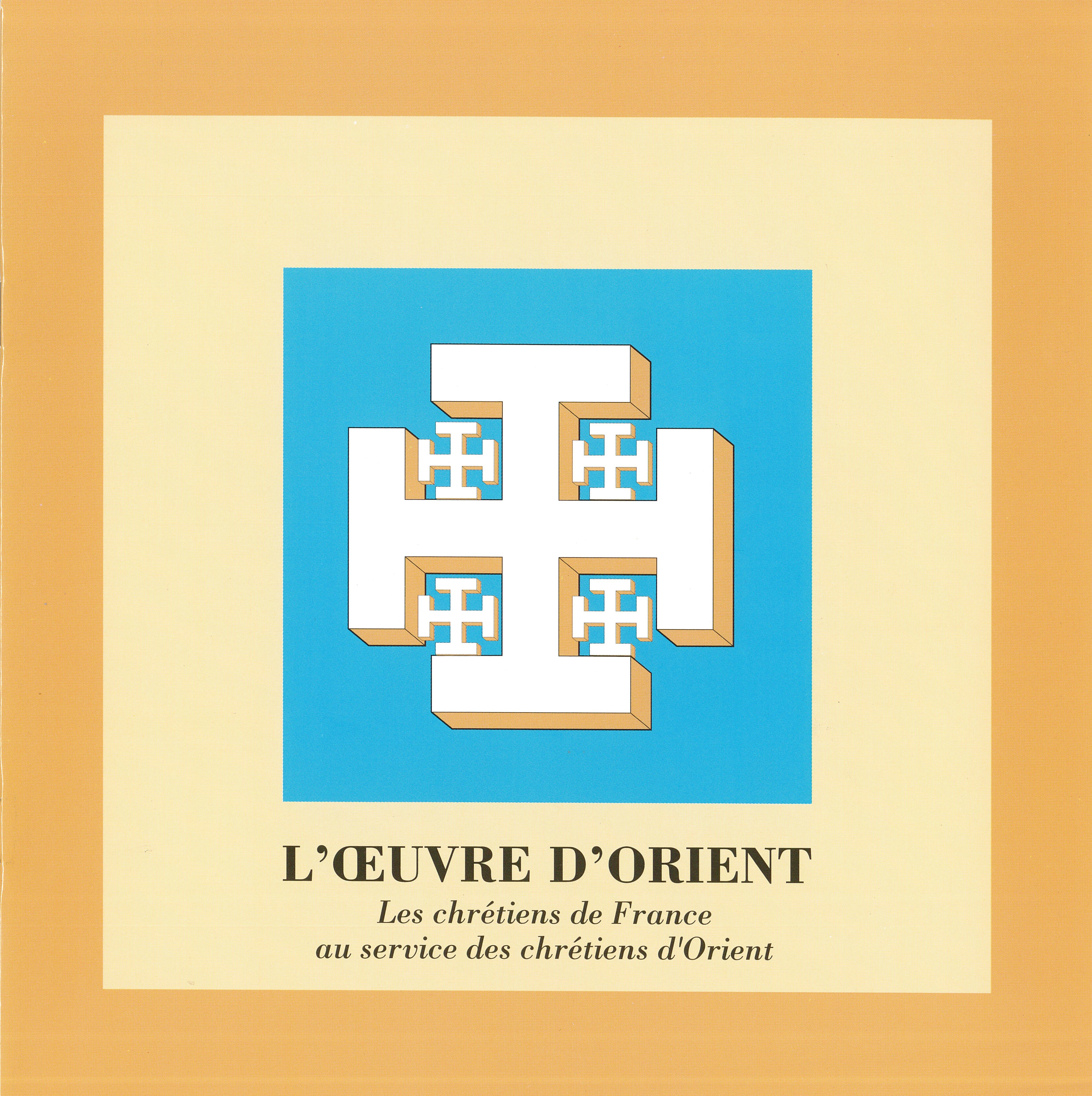 Scan en jpg. de la plaquette d'information sur L'Œuvre d'Orient, réalisé par Julien-Antoine Desforges\Œuvre d’Orient, le 11 septembre 2017.0001